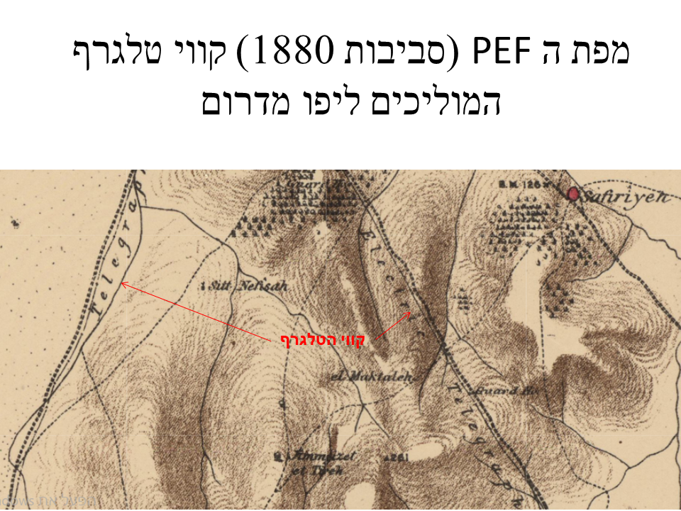 קטע ממפת ה PEF בו מסומנים קווי הטלגרף המוליכים ליפו מדרום